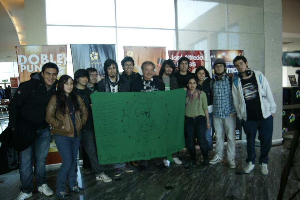 Equipo completo junto a José Alfredo Fuentes.